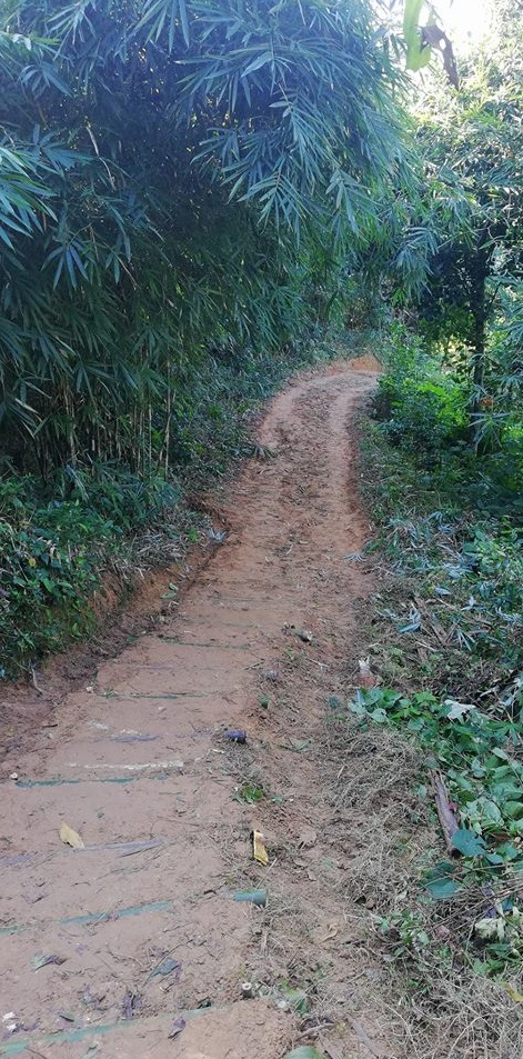 ৪০০ ফুট উঁচু কৈলাশটিলার উপরে উঠার সিঁড়ি।